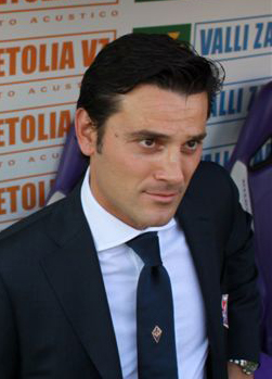 Montella sulla panchina della Fiorentina.